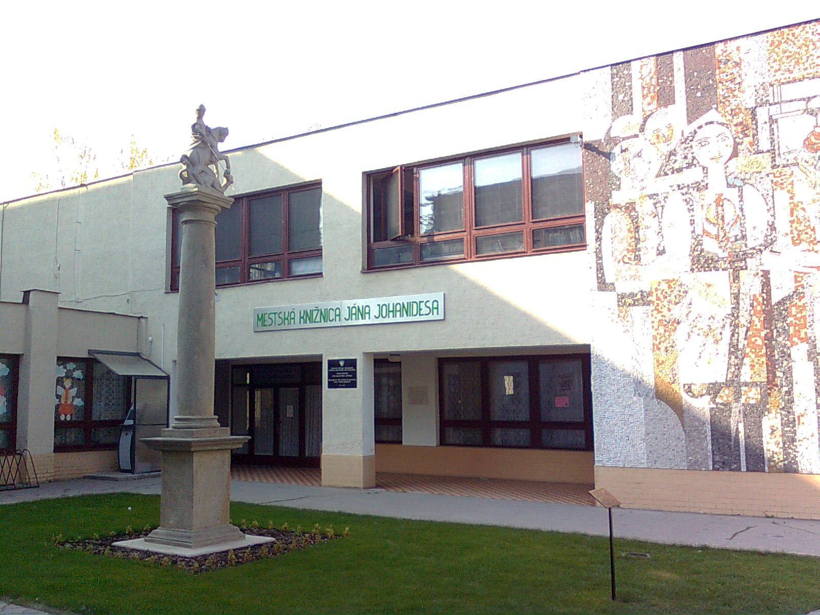 Knižnica Jána Johanidesa